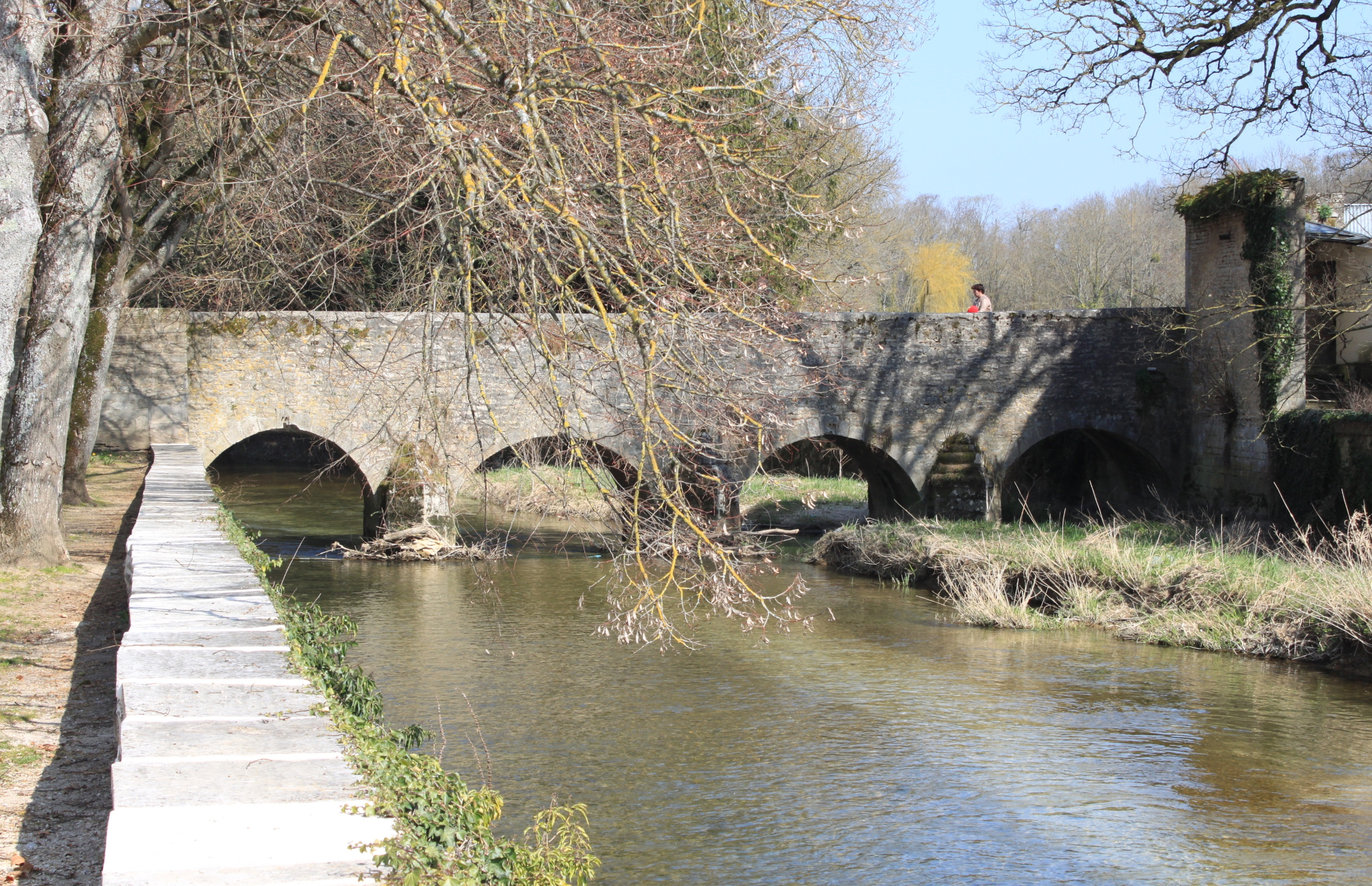 Pont des Boulangers sur la Seine, Châtillon-sur-Seine, Côte-d'Or, Bourgogne, France